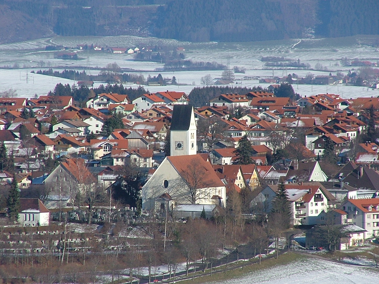 Altusried,Foto von Richard Mayer